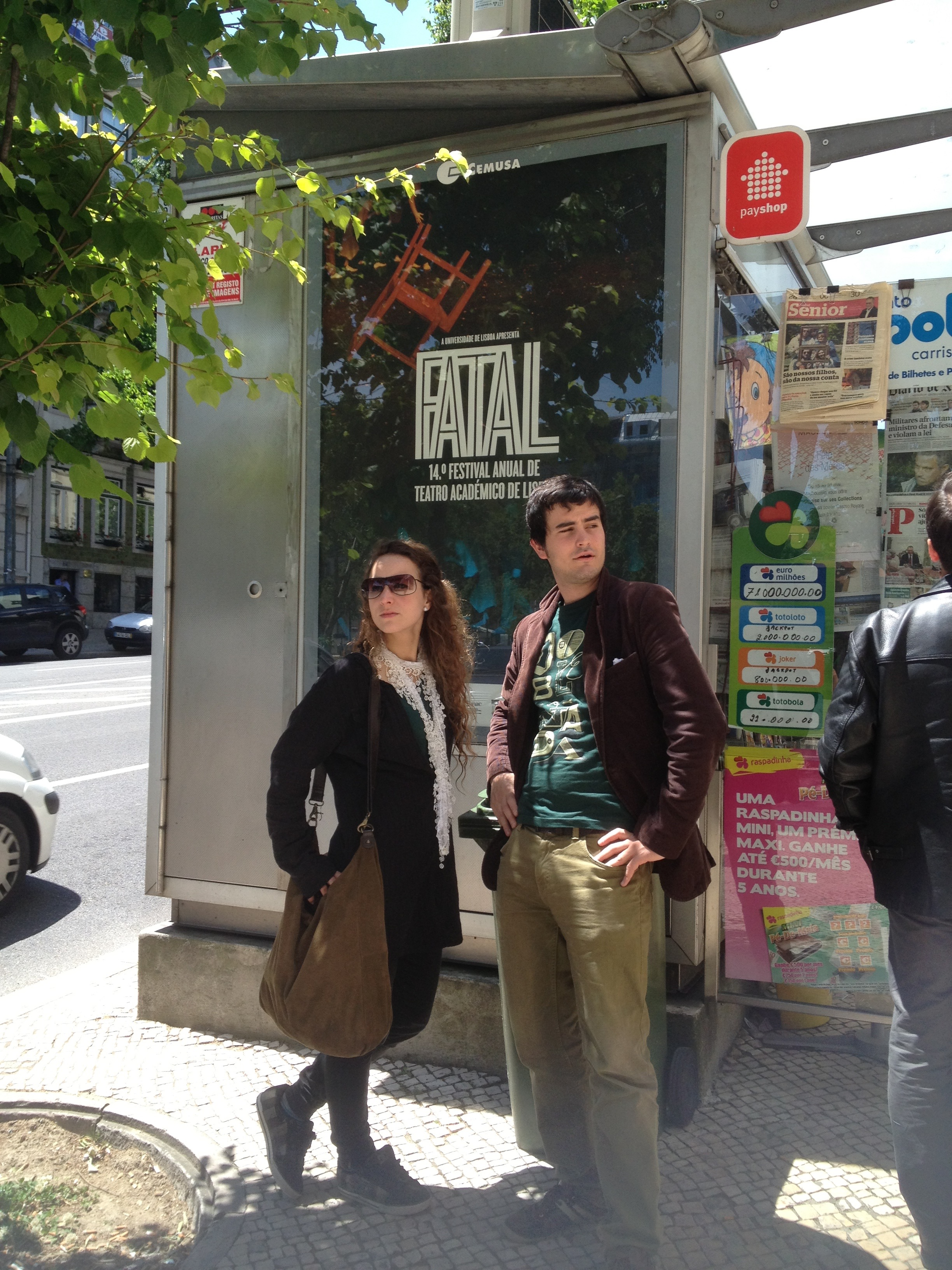 Actores barceloneses posando junto al cartel oficial del FATAL 2013.